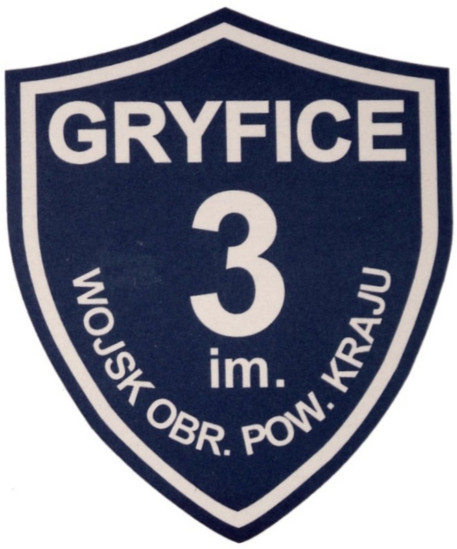 Tarcza Szkoły Podstawowej nr 3 w Gryficach